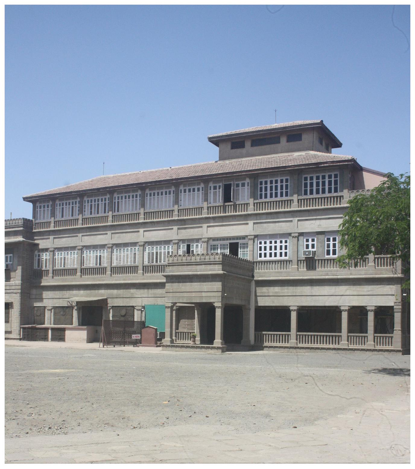 Nilambagh Palace